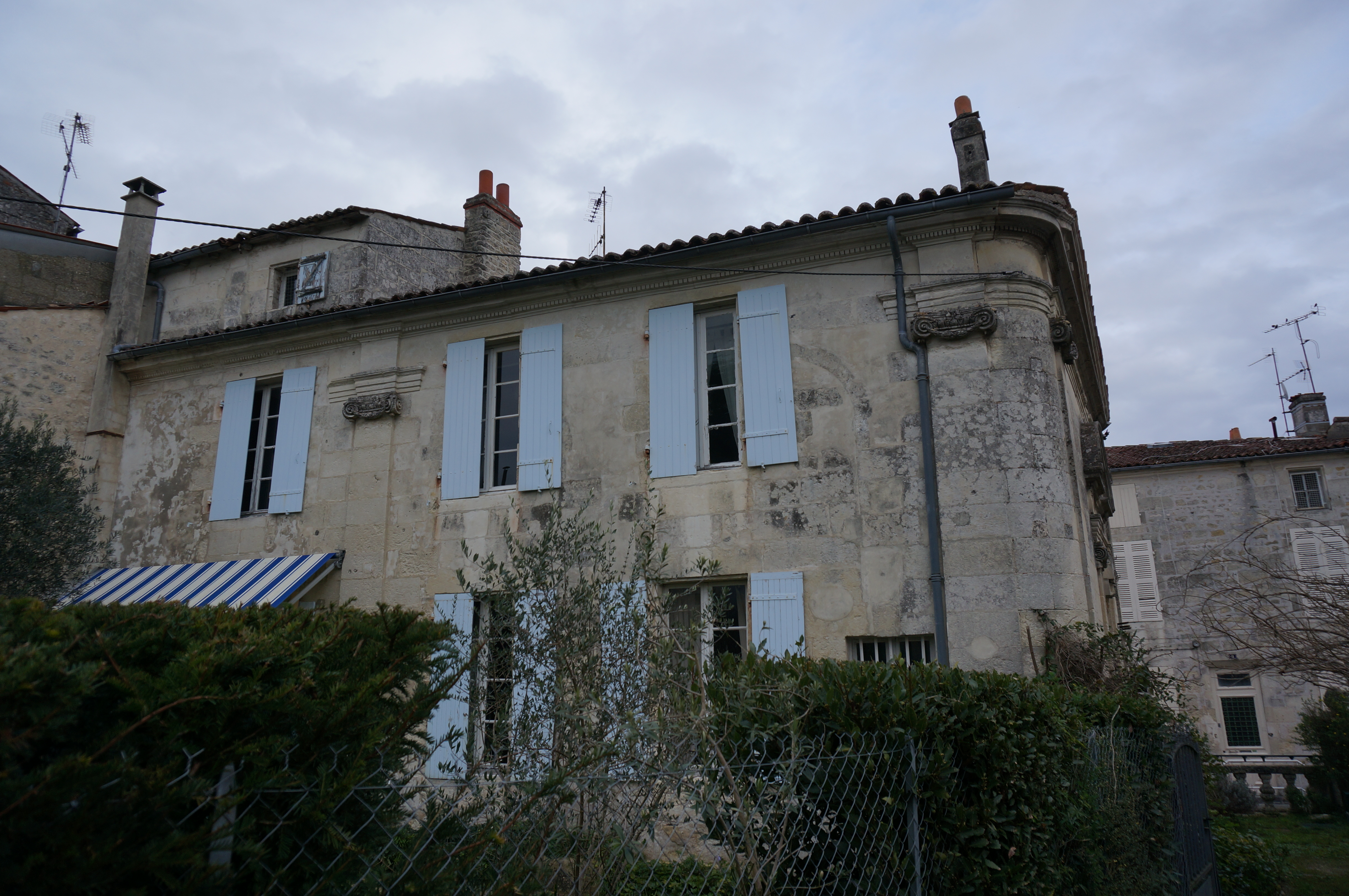 Ancienne faculté de chirurgie de Saintes.